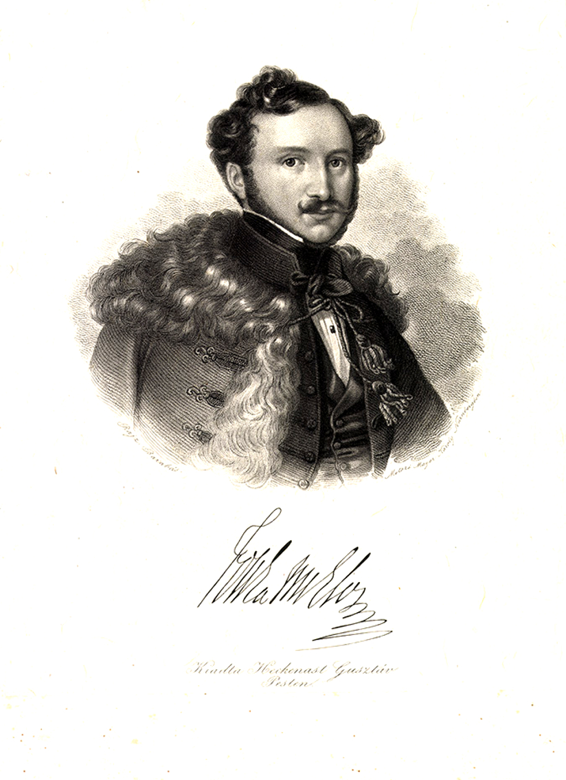 Jósika Miklós, branyicskai báró (Torda, 1794. április 28. – Drezda, 1865. február 27.) író, újságíró, a magyar romantikus regény megteremtője.